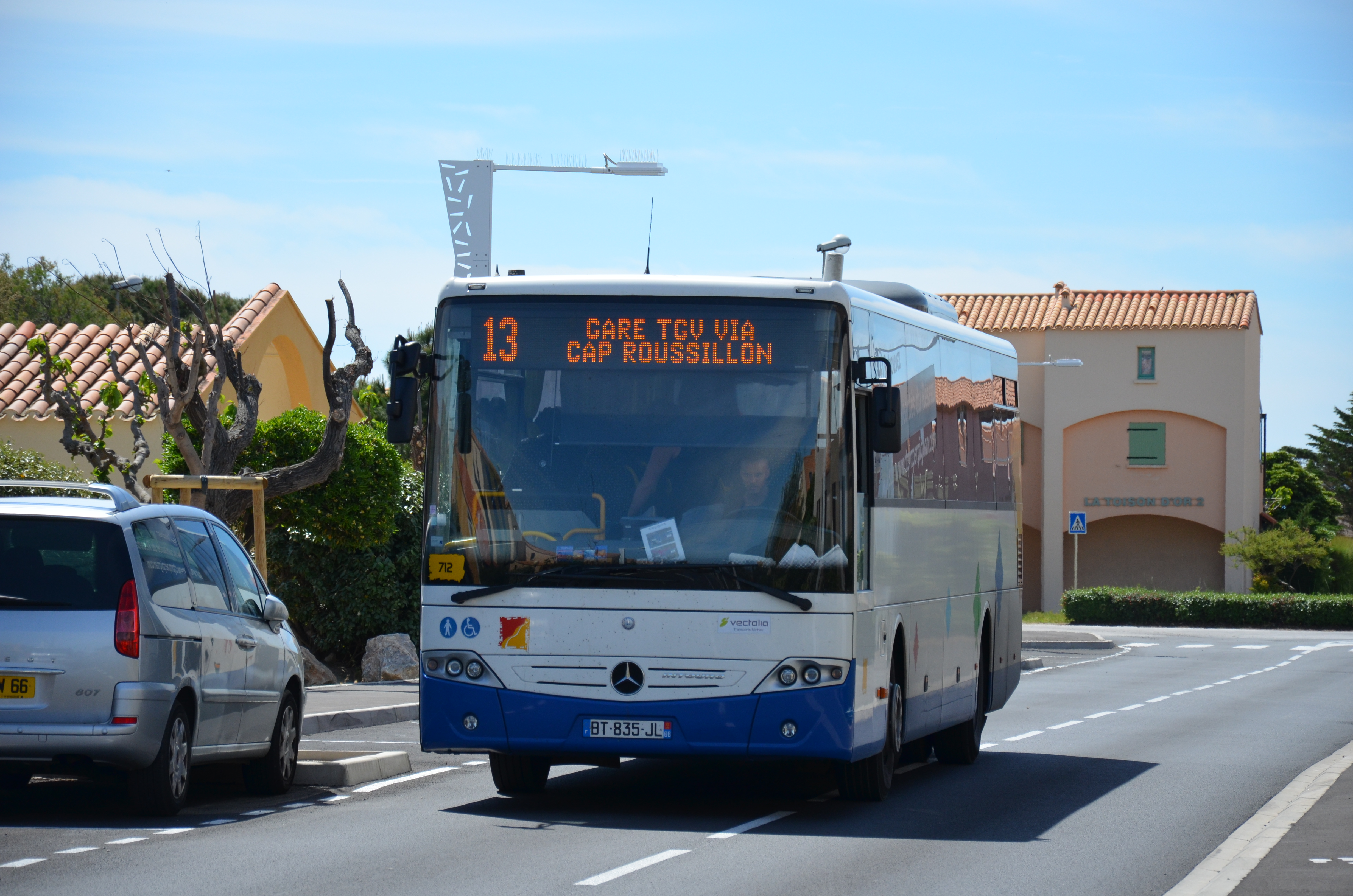 Mercedes Intouro n°712 sur la commune Le Barcarès, près de son terminus "Le Barcarès", sur le réseau CTPM de Perpignan.